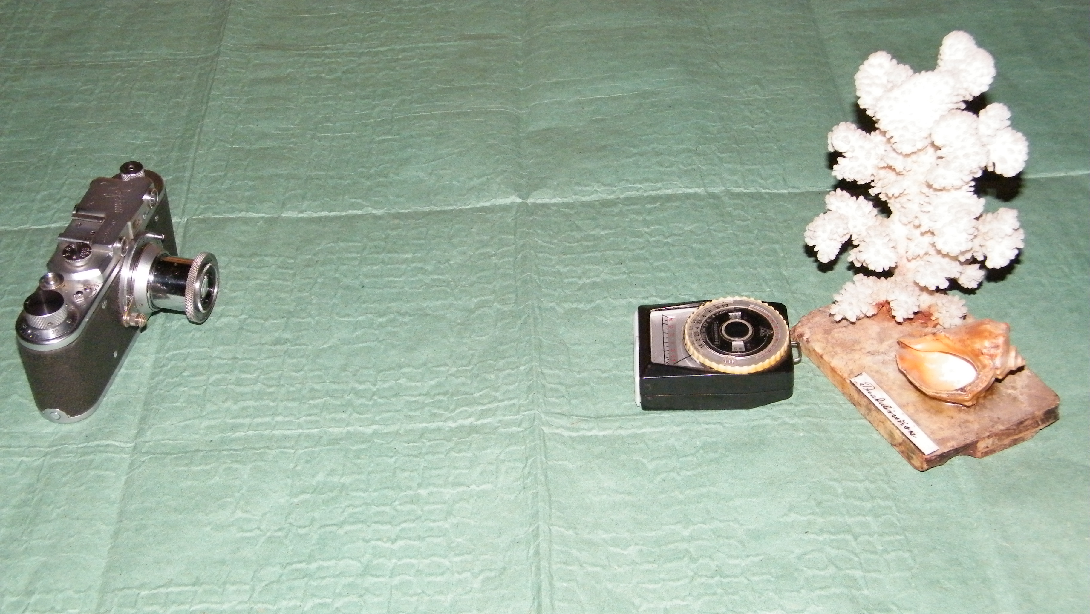 Экспонометрия по освещённости